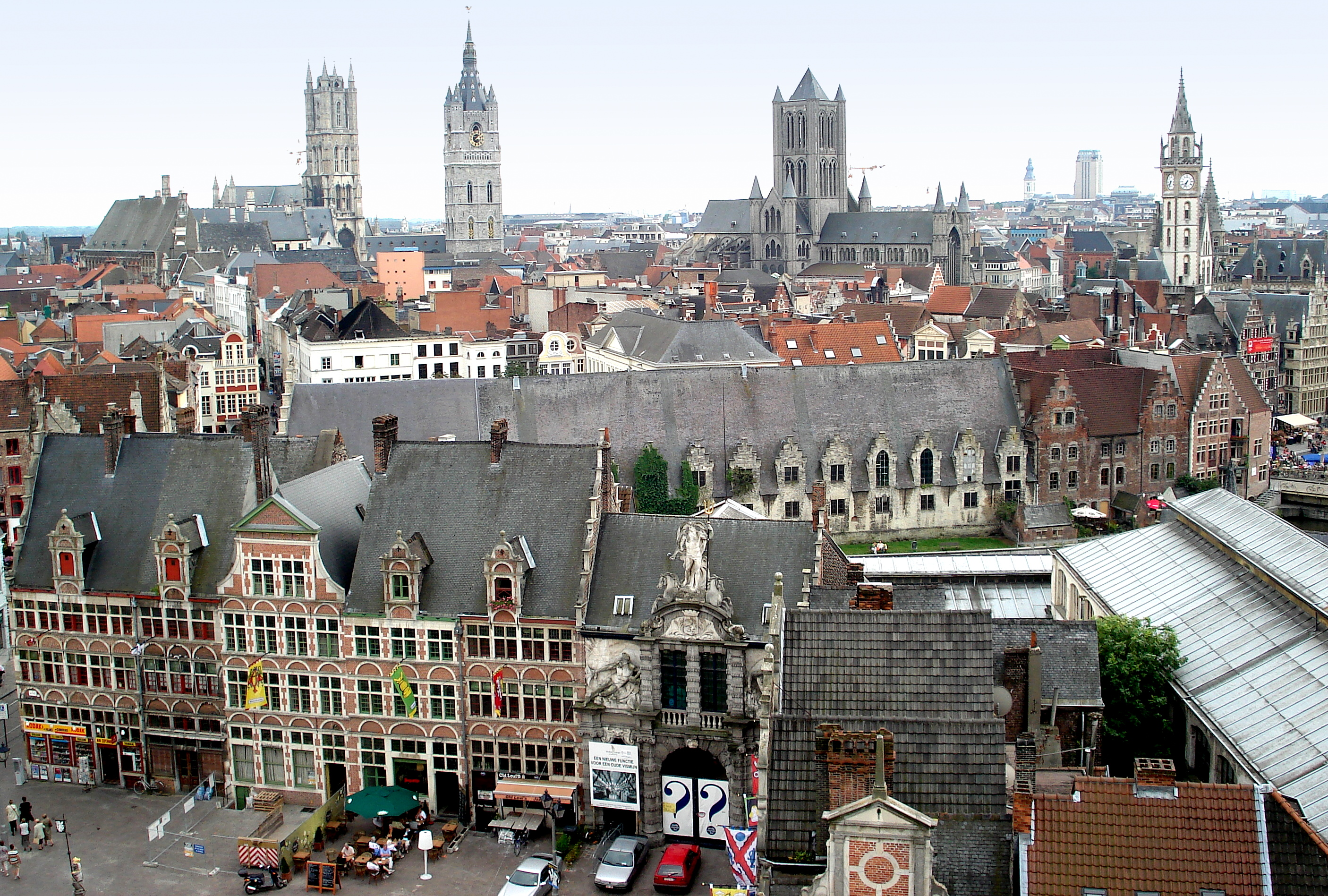 Panorama de la vieille ville de Gand (Belgique), depuis le sommet du donjon du Château des Comtes. De gauche à droite, l’on aperçoit, en haut : la maison de la Keure de l’hôtel de ville (haute toiture gris sombre avec cheminée massive) ; la nef et le clocher de la cathédrale Saint-Bavon; le beffroi, surmonté de son dragon ; l’église Saint-Nicolas, avec ses tourelles d’angle ; sur la ligne d’horizon : le clocher à bulbe de l’église Saint-Pierre, et la tour grosso modo parallélipipédique de la bibliothèque universitaire ; la tour effilée, à horloge, de l’ancienne poste centrale néogothique. Au second plan : la Halle aux viandes (Vleeshuis), édifice tout en longueur, à haute toiture grise percée de nombreuses lucarnes. Au premier plan : la place Sint-Veerle, bordée notamment du bâtiment d’entrée de la Criée au poisson (Oude Vismijn) avec sa statue de Neptune.